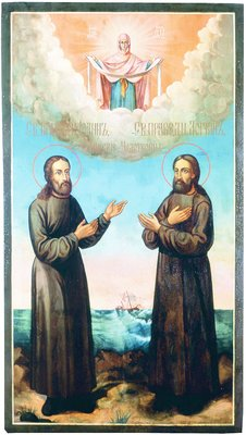 Праведные Иоанн и Лонгин Яренгские. Икона. Вторая половина XIX века. Иконописная мастерская Соловецкого монастыря (АМИИ)